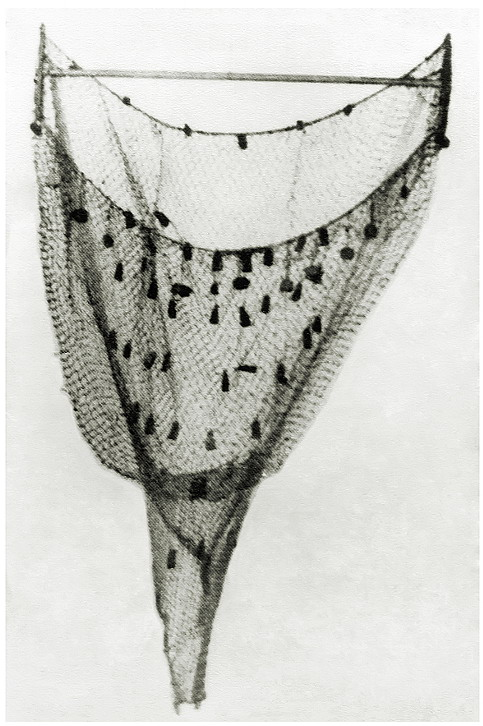 Das Keitelgarn oder -netz ist ein Schlepp- bzw. Grundschleppnetz und kam auf dem Kurischen Haff zum Einsatz. Es wird durch den Keitelbaum und die Botten offen gehalten (das doppel-T-förmige Gestell oben). Hier ist es hängend dargestellt - beim Fischen befand sich der Keitelbaum parallel zum Grund und das Netz schwamm hinterher.